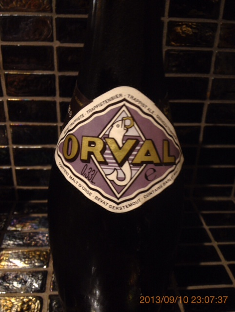 オルヴァルラベル